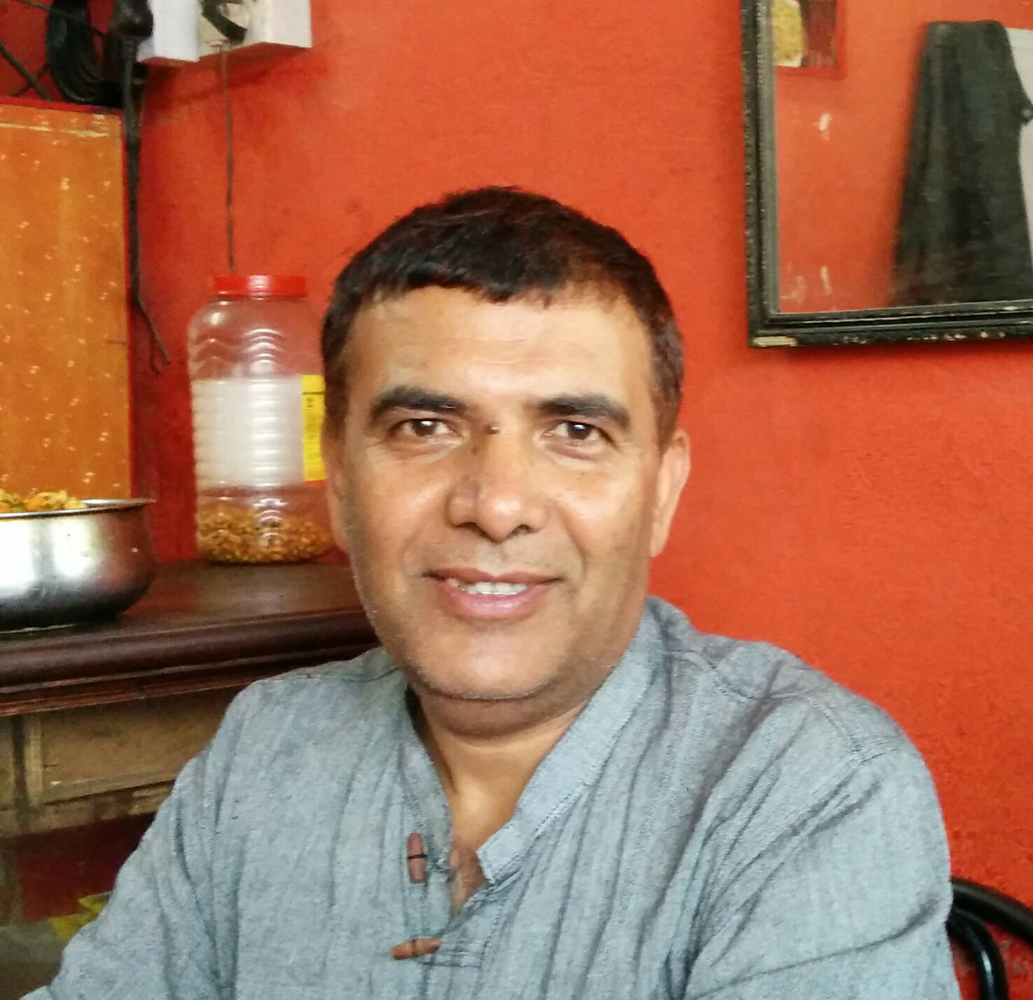 नेपाली: पुण्य प्रसाद पराजुली